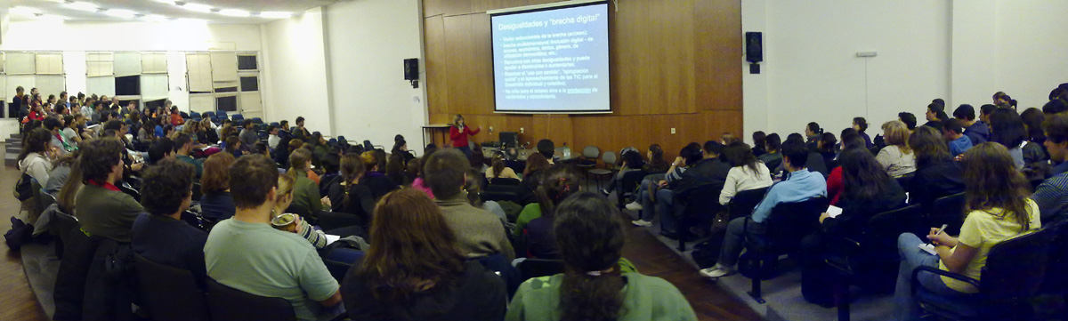 Jornada de Flor de Ceibo en la Facultad de Psicología de la UDELAR